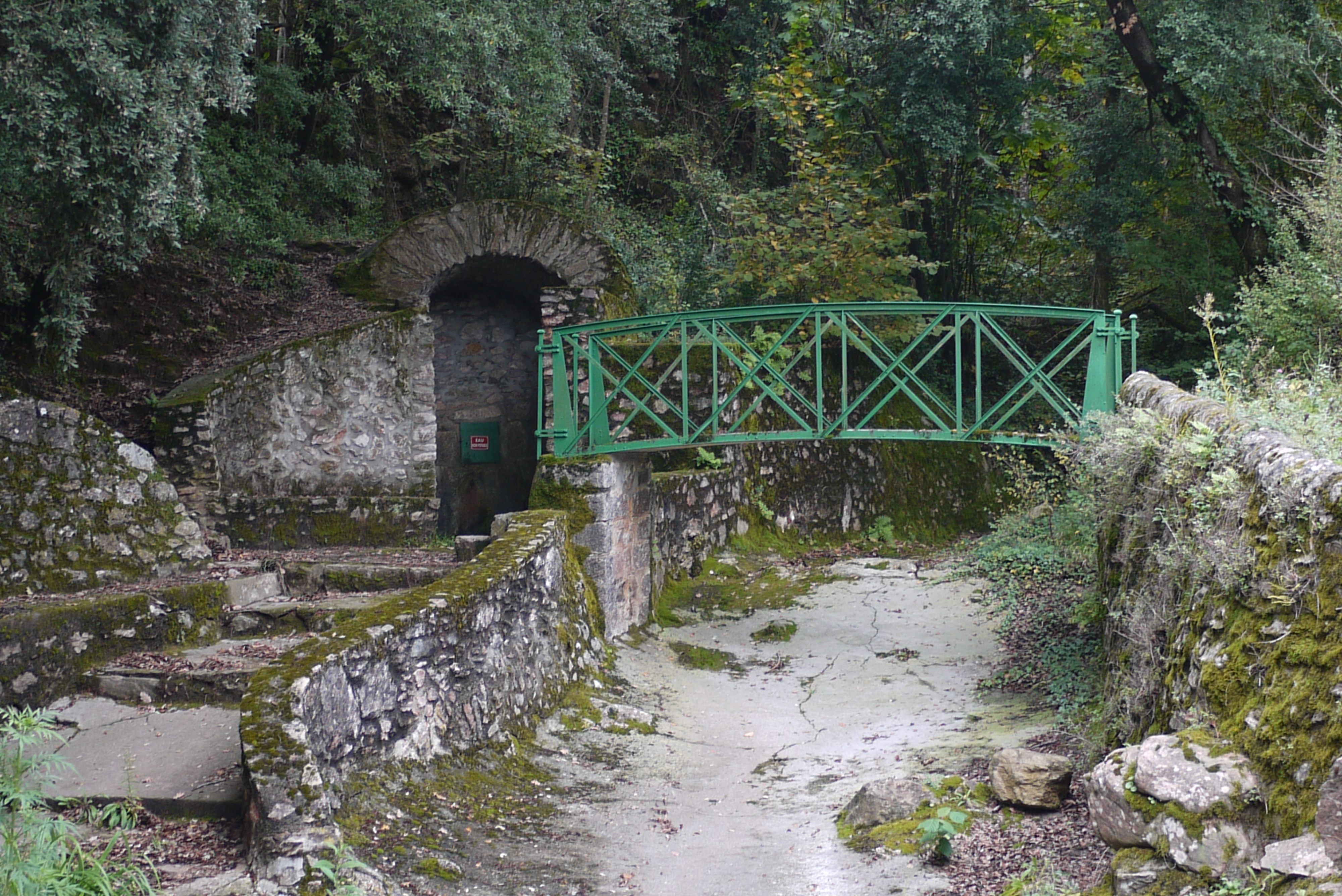 Fontaine et lit de la rivière du Llargou à Reynès